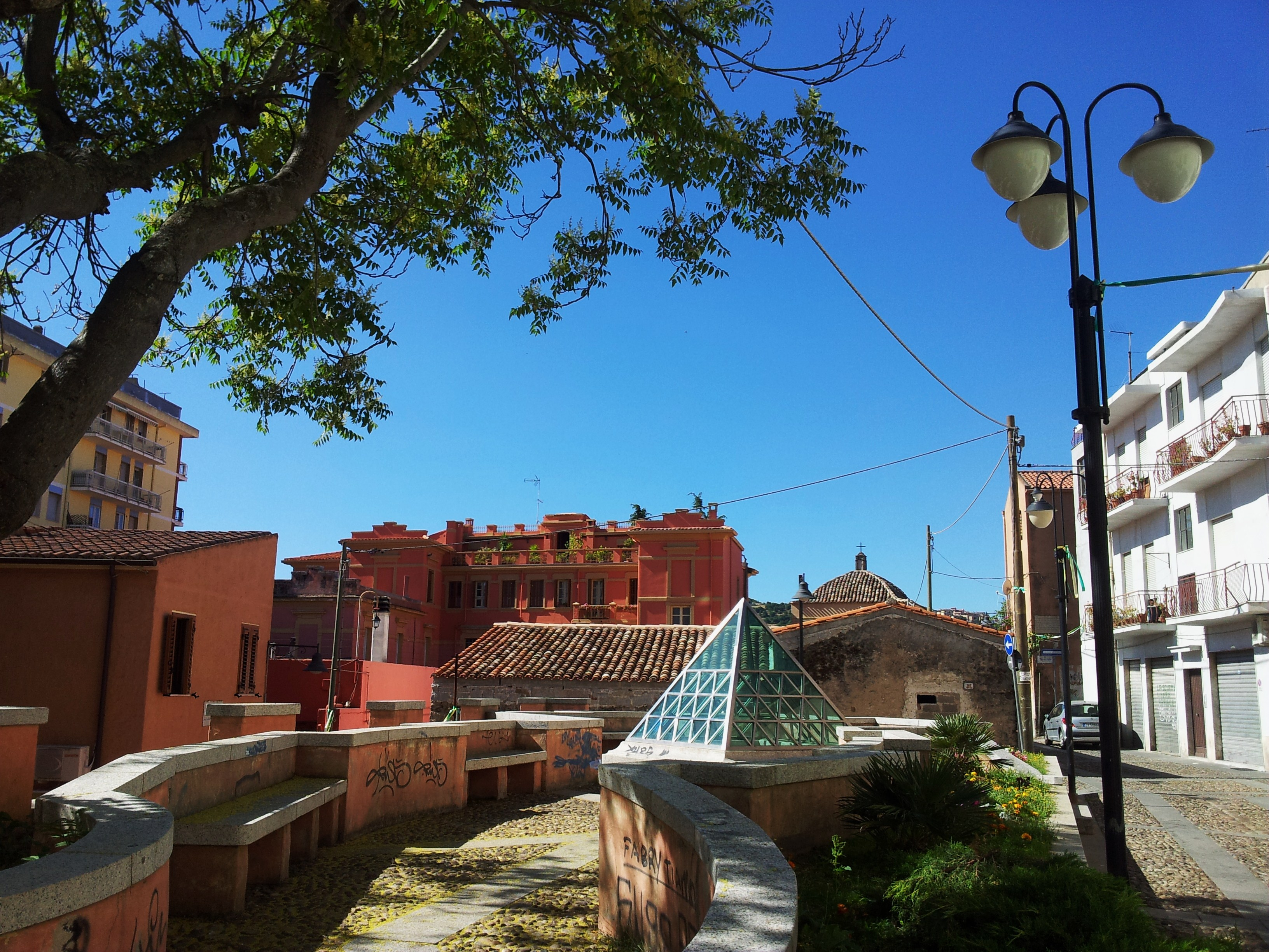 quartiere Seuna